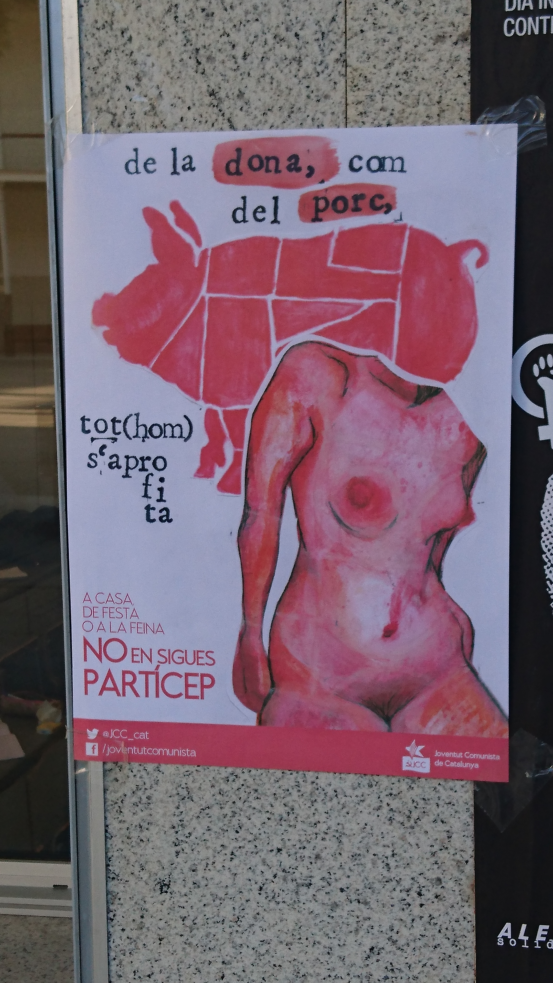 Cartell de la Joventut Comunista de Catalunya, referent juvenil de Comunistes de Catalunya, en motiu del 25 de novembre, Dia internacional per a l'eliminació de la violència contra les dones, de 2015.